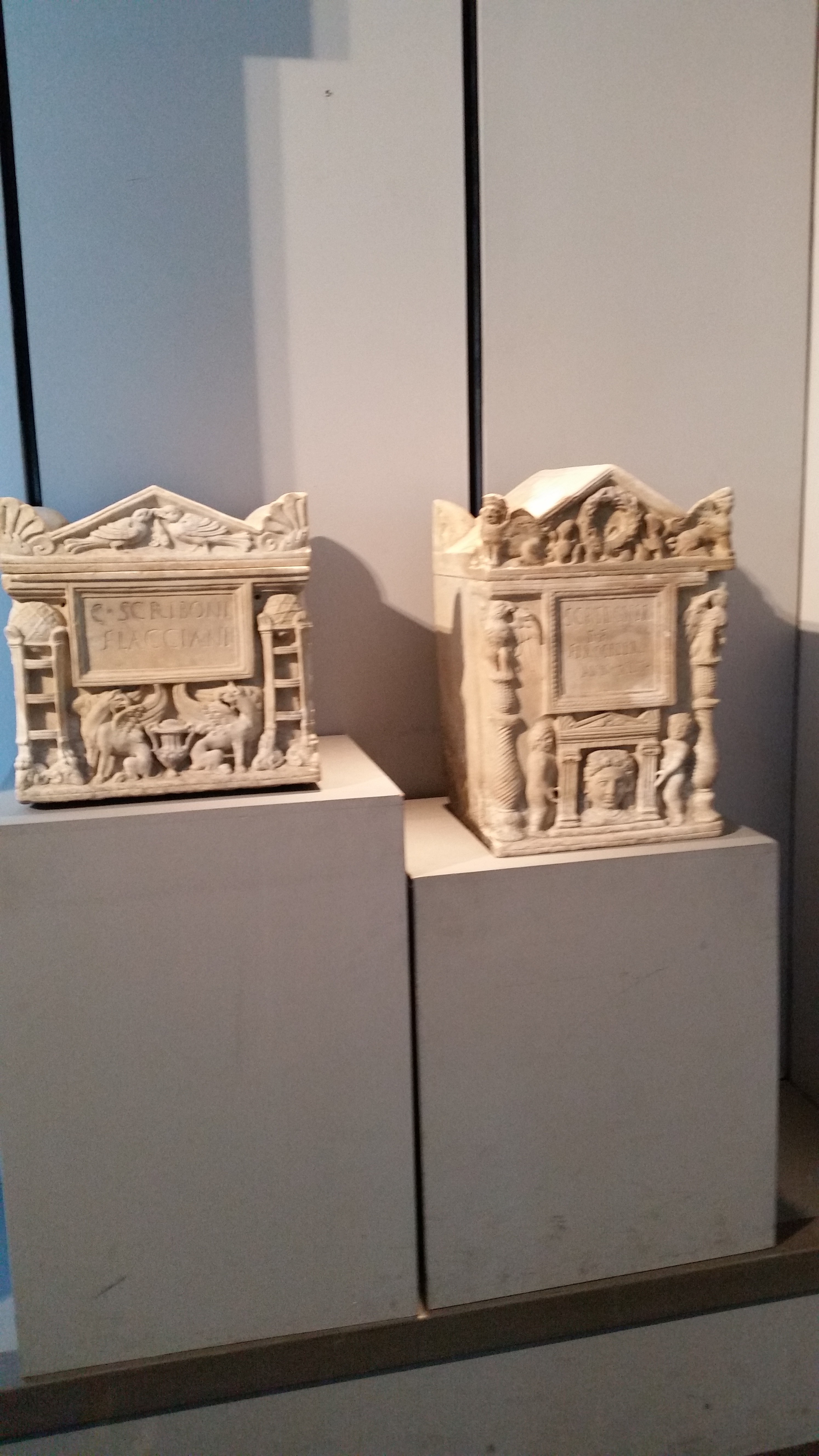 Columbaria delle famiglie centuripine